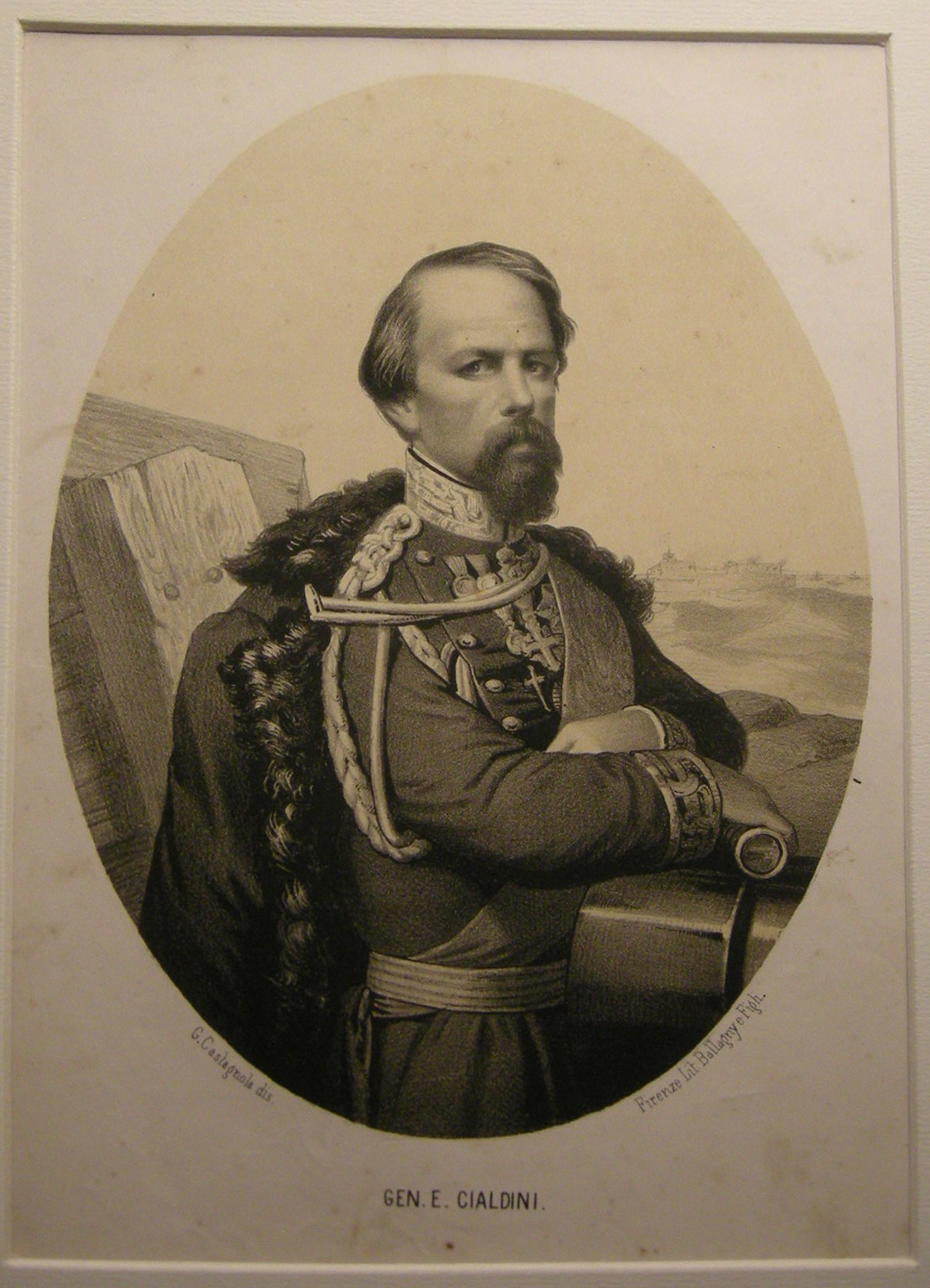 Litografia ballagny, fine XIX sec. gen. enrico cialdini